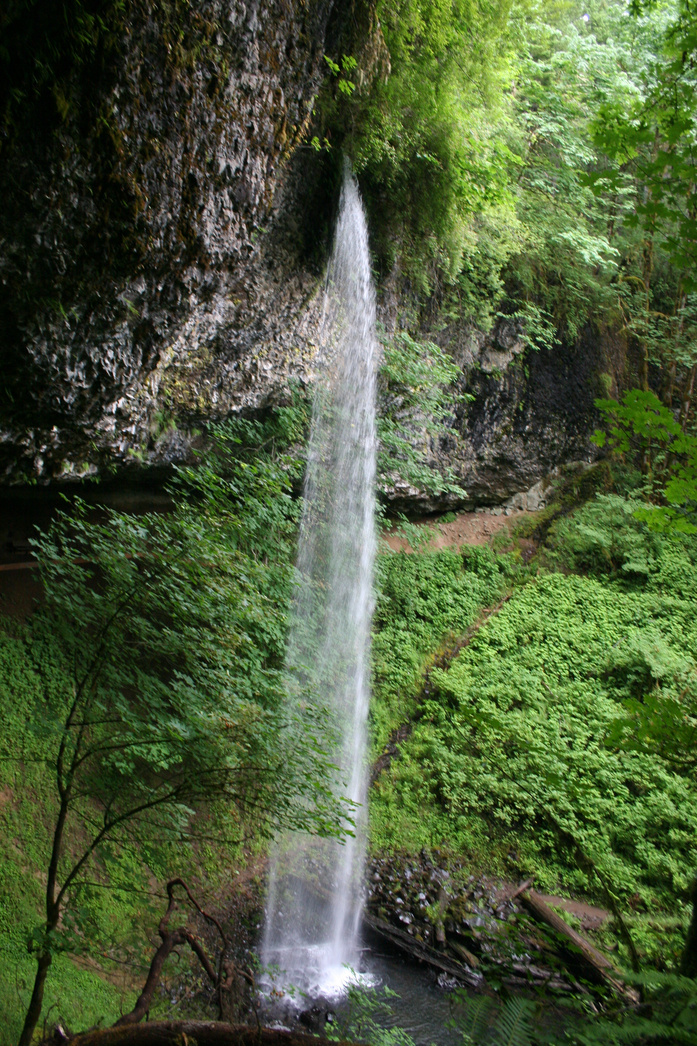 Shellburg Falls, Oregon